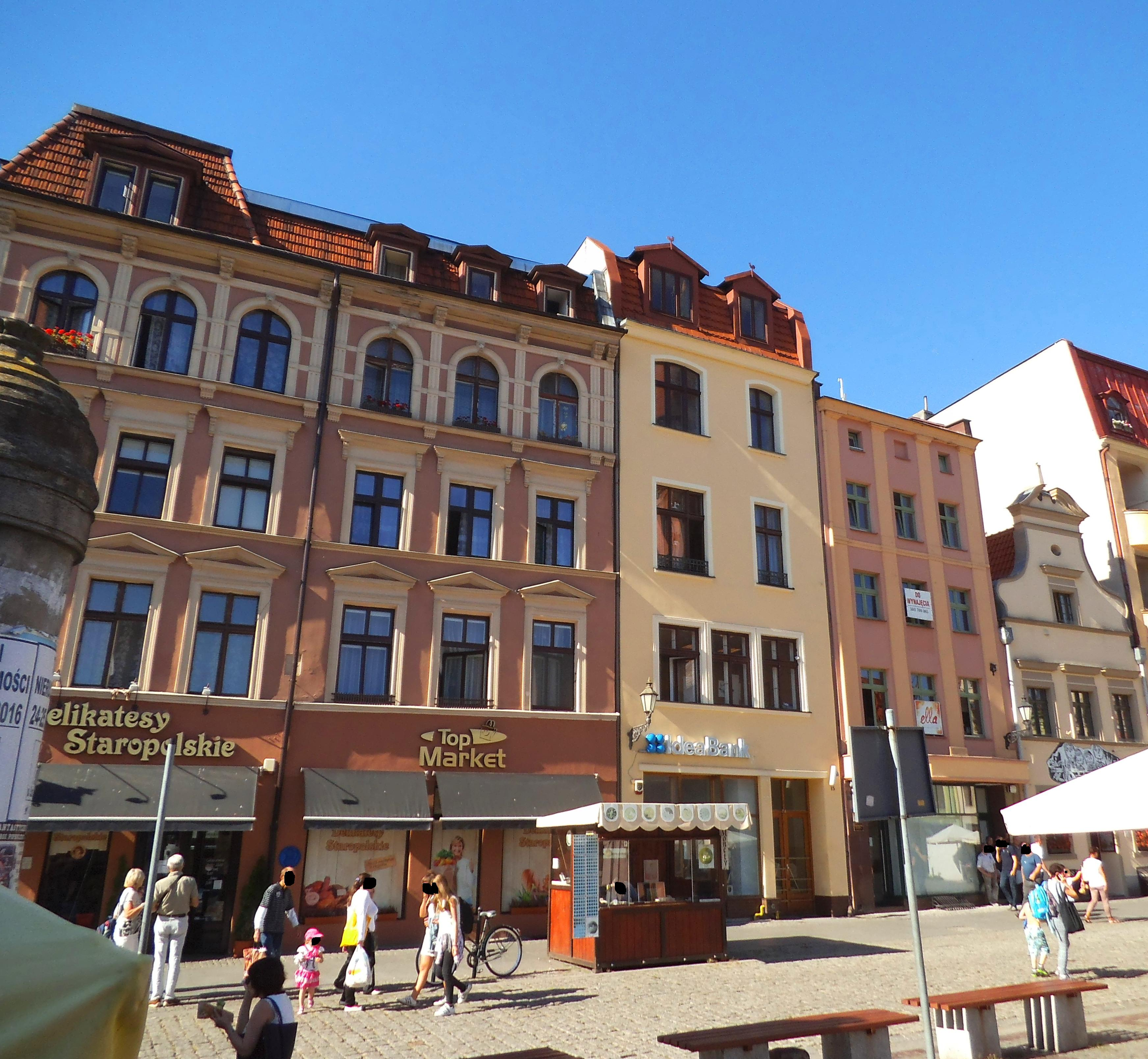 Pierzeja północna Rynku Nowomiejskiego w Toruniu